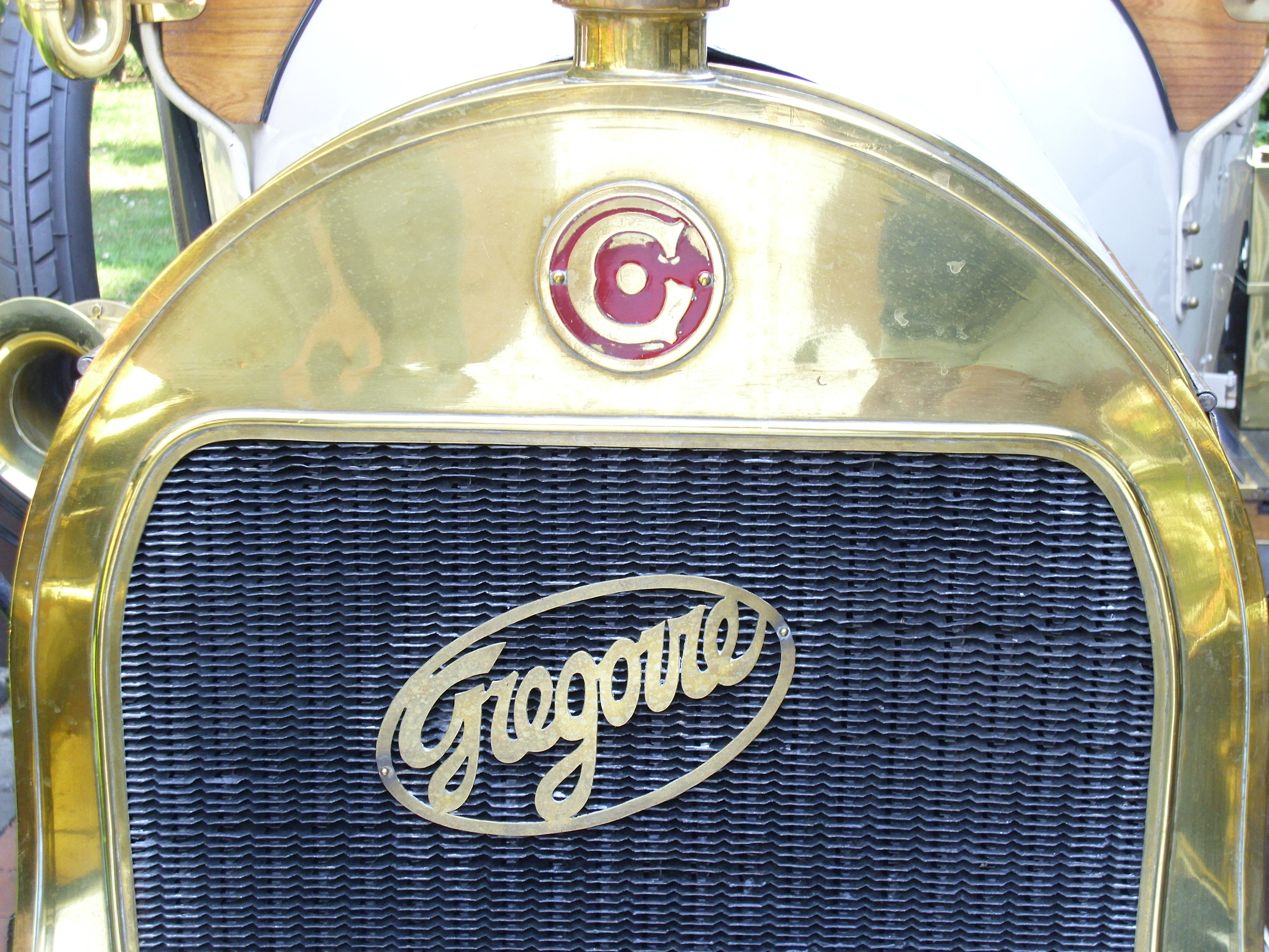 Emblem Grégoire